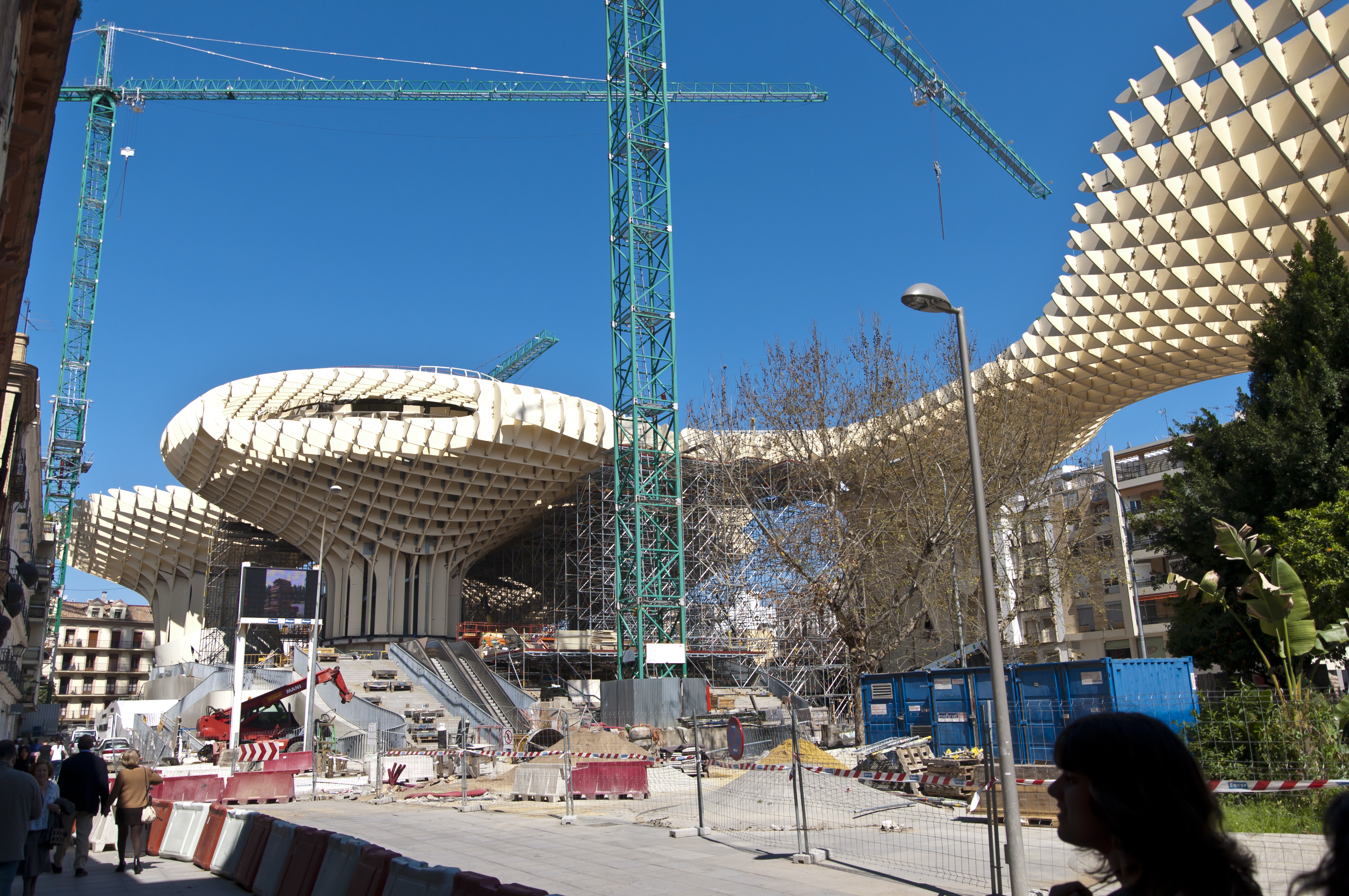 Metropol Parasol in de Spaanse stad Sevilla